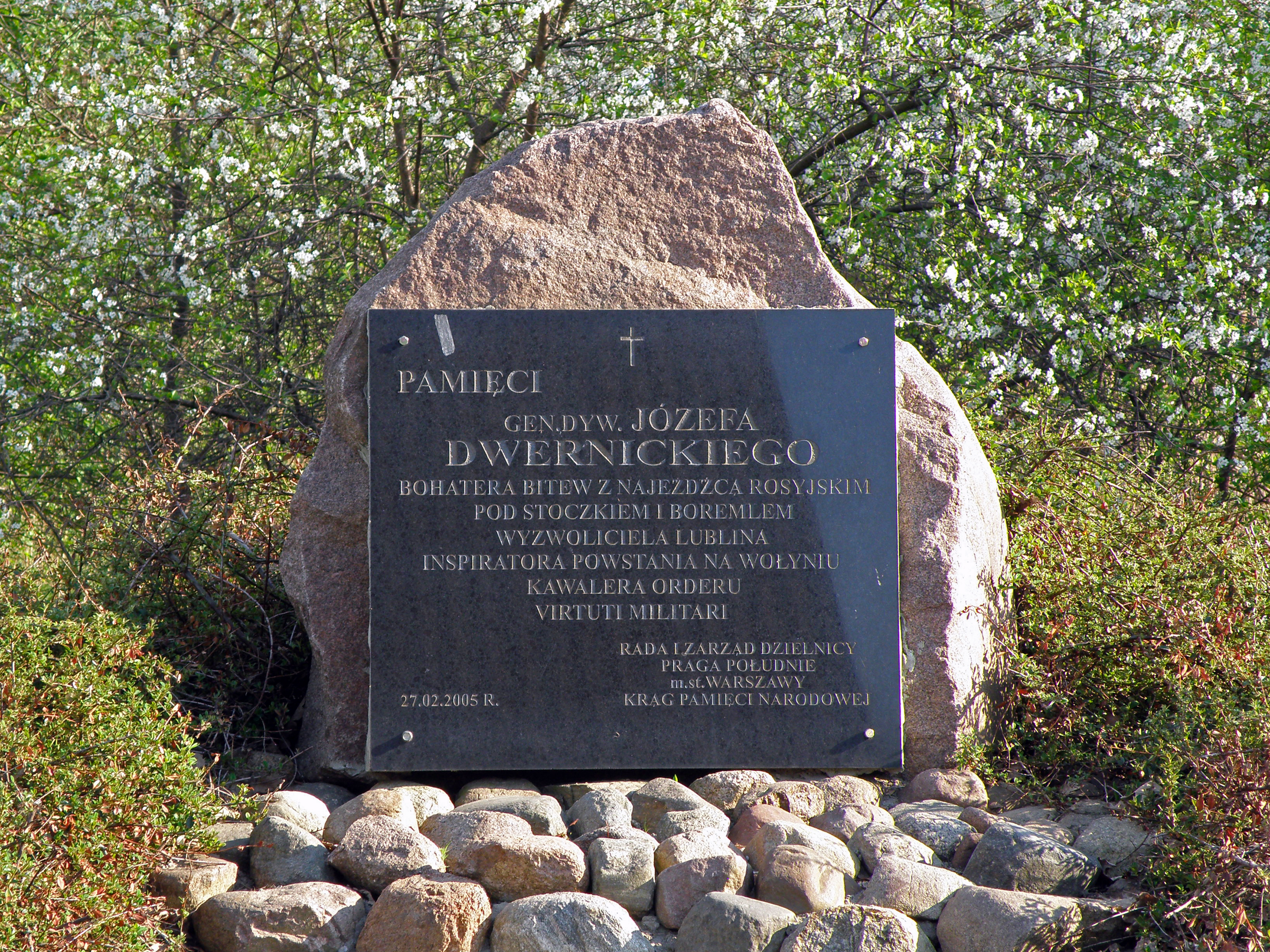 Olszynka Grochowska - Aleja Chwały, ul. Traczy. Głaz pamięci Józefa Dwernickiego.